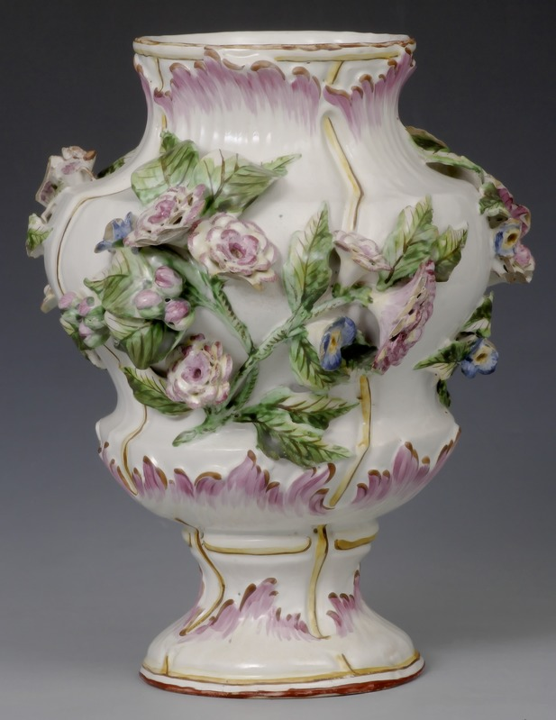 Pirnikujuline keha, madal kael. Kaelal, kehal, jala ühenduskohal ning kabjal reljeefne dekoor. Kaunistuseks plastilised oksad õitega, ühel liblikas ja kaks putukat.